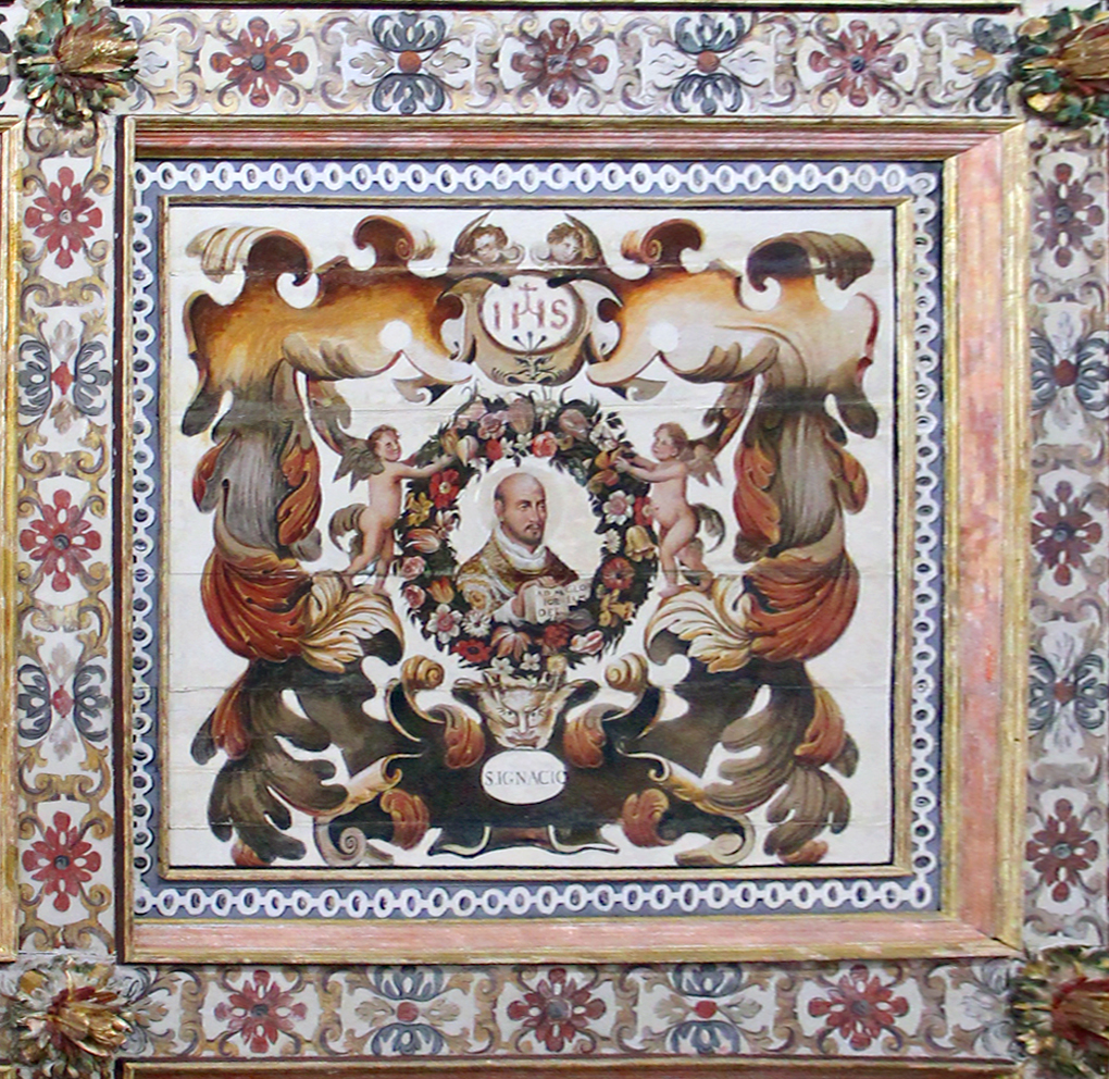 retrato de Santo Inácio de Loyola no teto da sacristia da Catedral de Salvador.